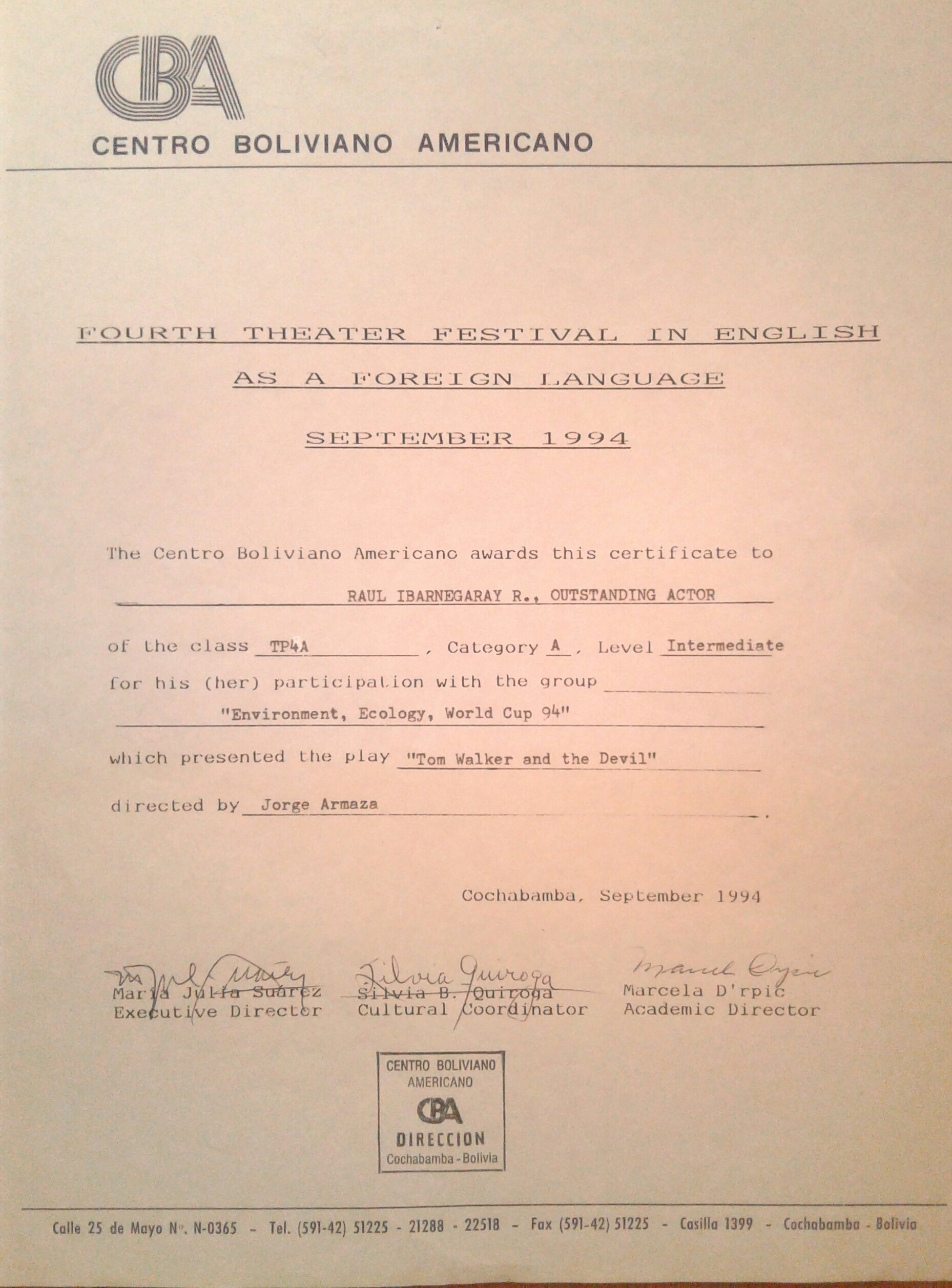 Actuación en la obra The Devil and Tom Walker (1994). Centro Boliviano Americano. Certificado por el premio de "actor sobresaliente"